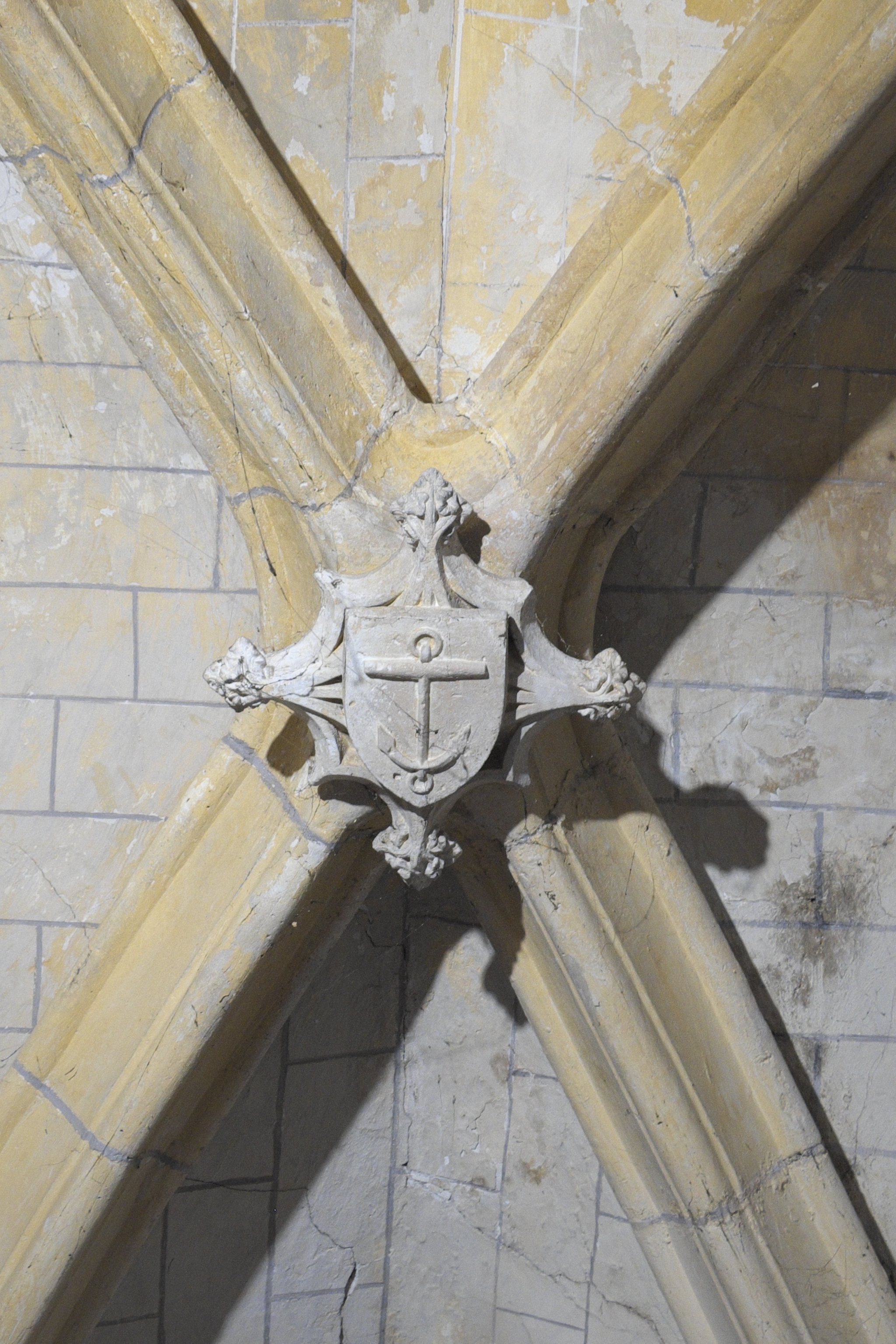 Katholische Pfarrkirche Sainte-Geneviève in Héricy im Département Seine-et-Marne (Île-de-France/Frankreich), Schlussstein